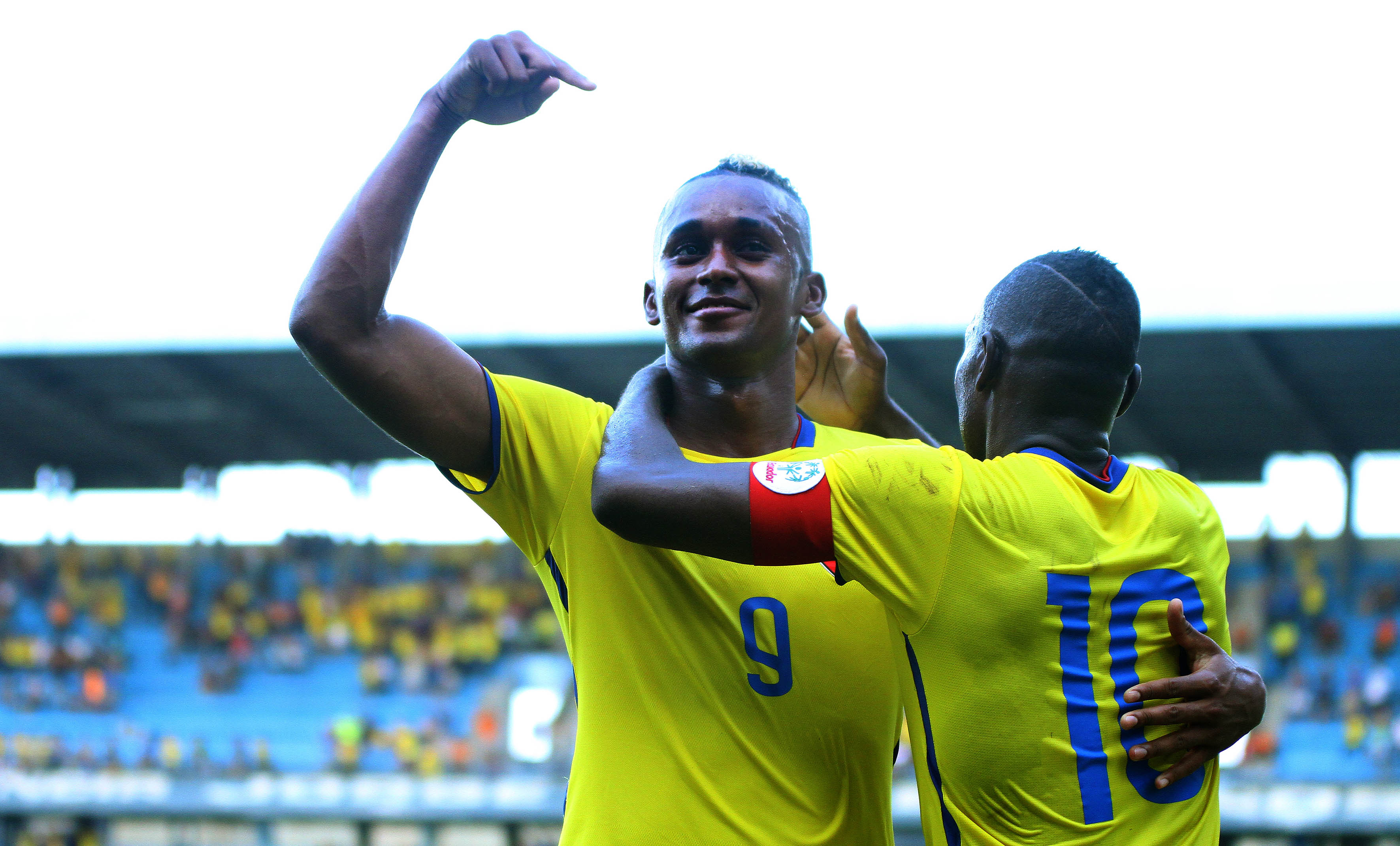 Guayaquil, 06 de jun (Andes).-En el estadio George Capwell, la selección de fútbol de Ecuador se enfrenta a Panamá en partido amistoso, Fidel Martinez festeja su gol Foto: César Muñoz/Andes